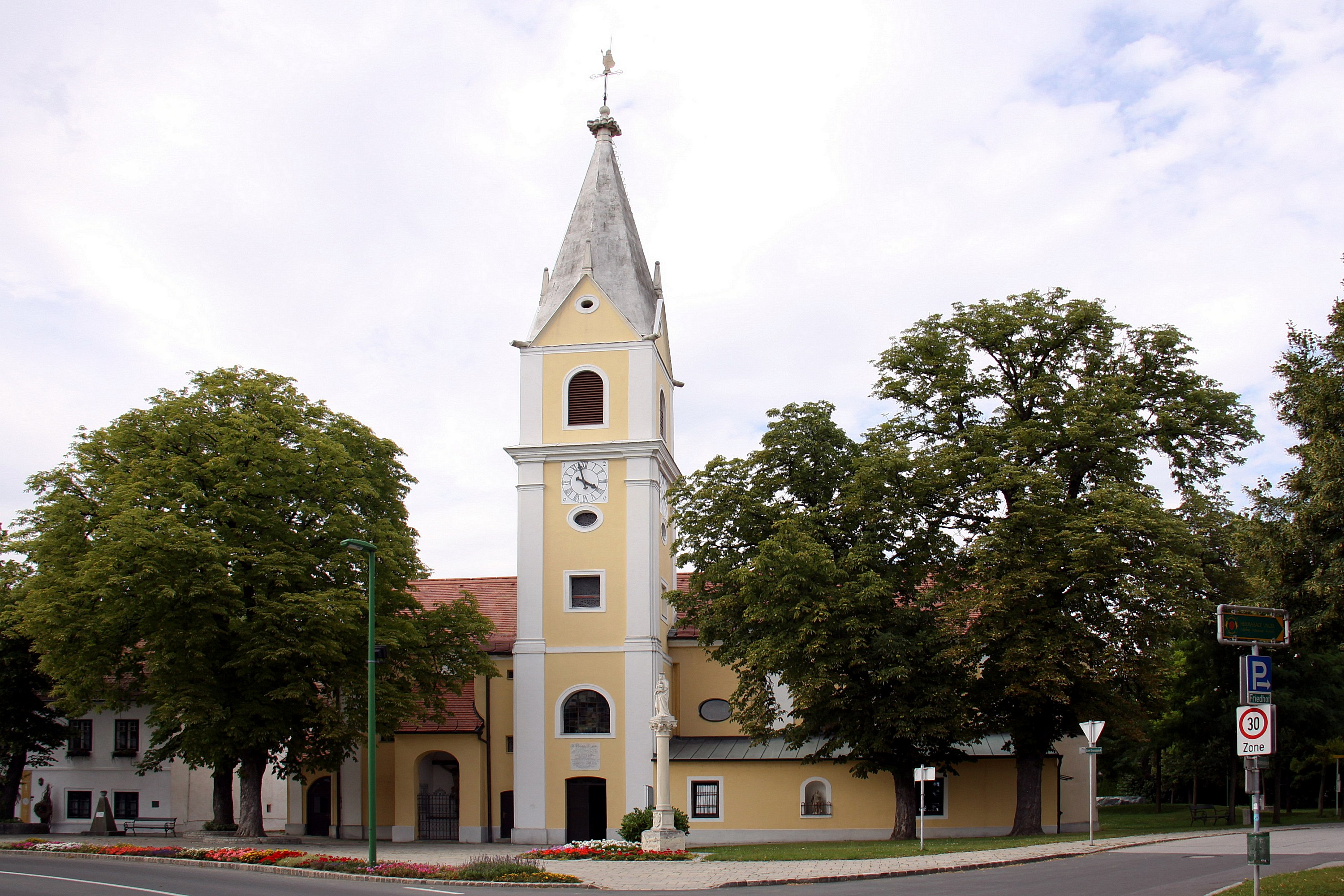 Denkmalgeschützte römisch-katholische Pfarrkirche in Pöttsching.